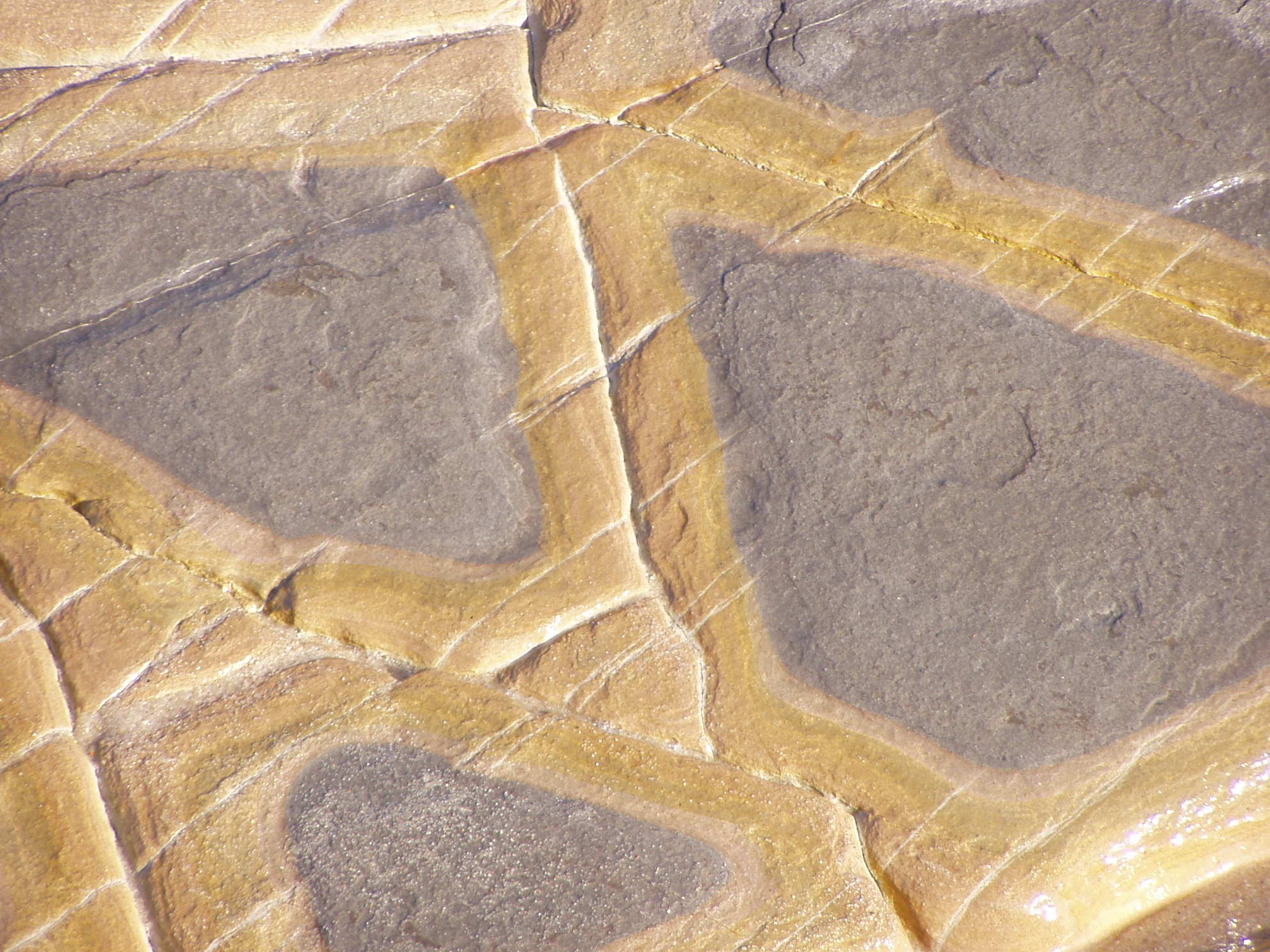 Multi-coloured limestone pattern at São Pedro de Muel beach, Marinha Grande, Portugal.